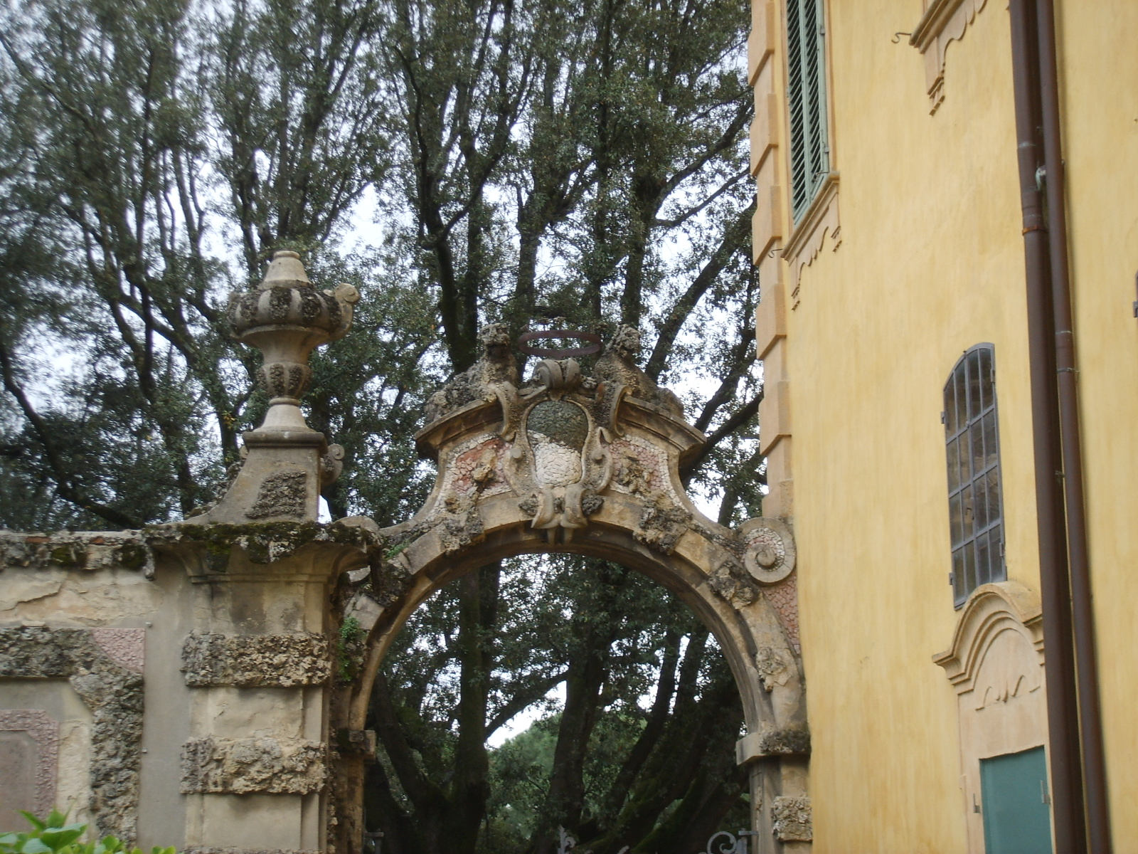 Villa la pietra, pomario, ingresso stemma capponi